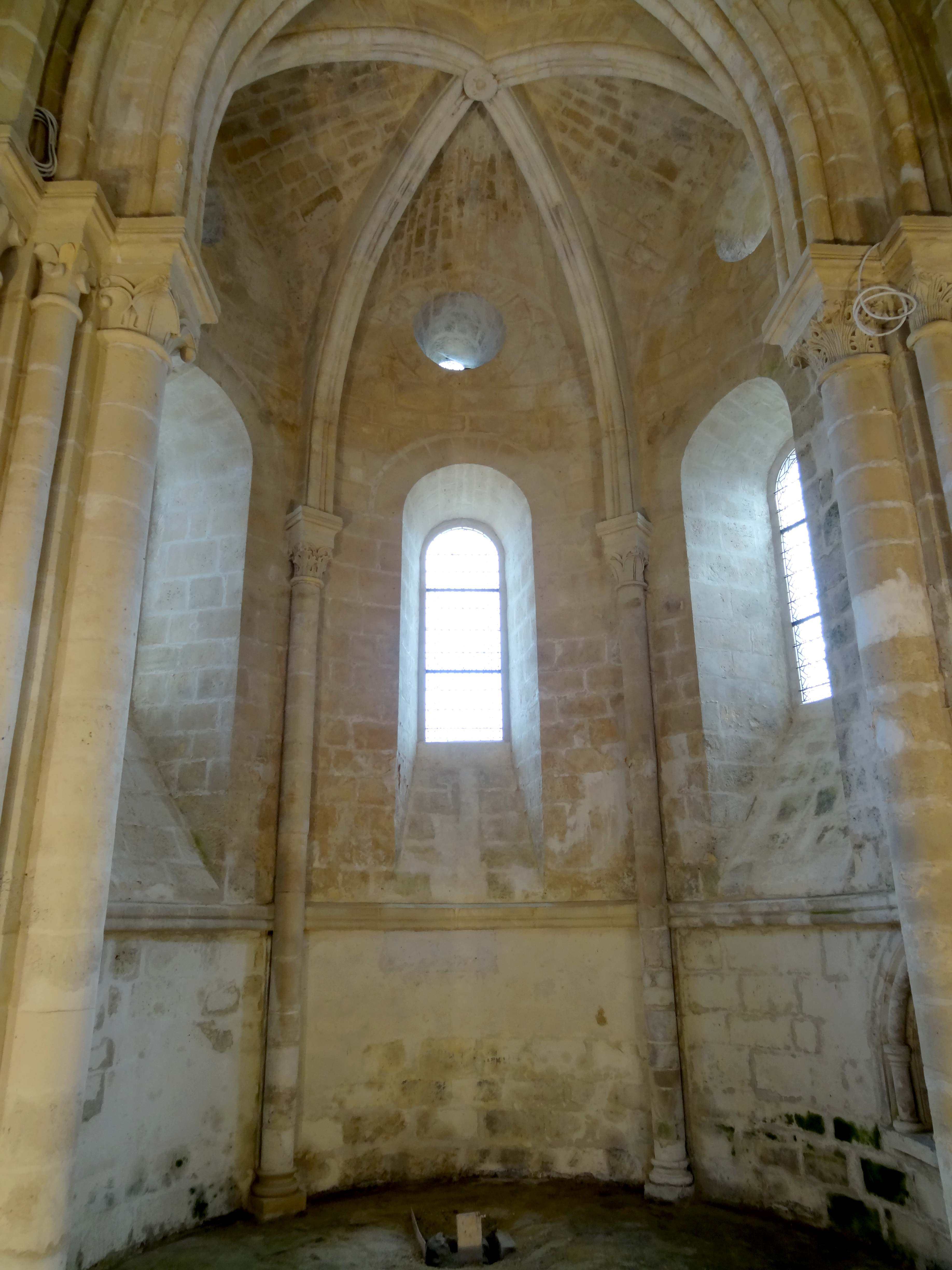 Intérieur de l'église - voir titre.